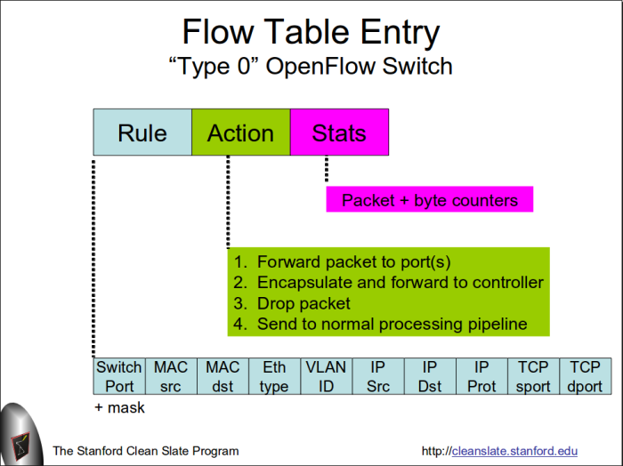 Монгол: Openflow-table-entry-med